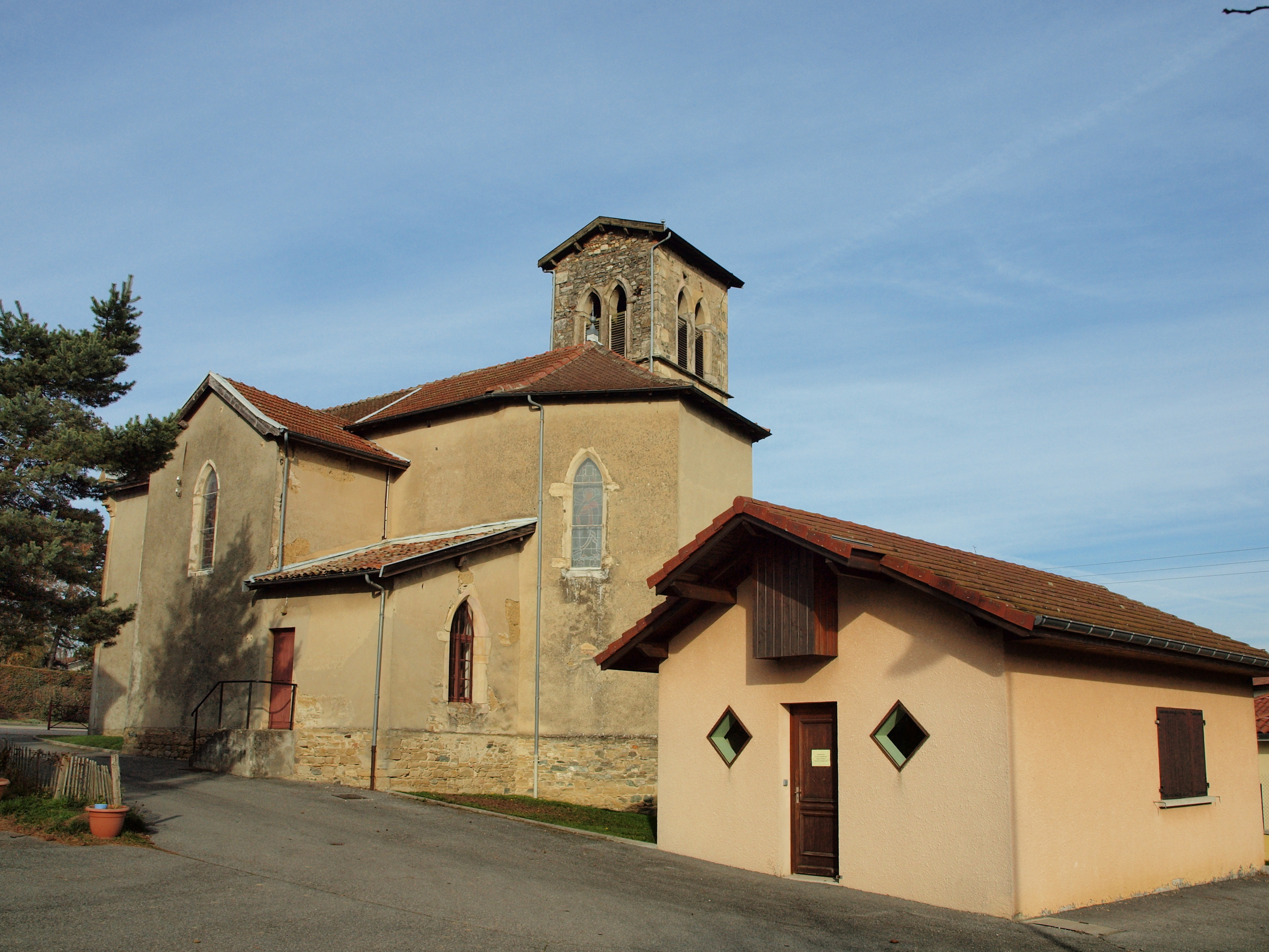 Chèzeneuve (Isère, France)